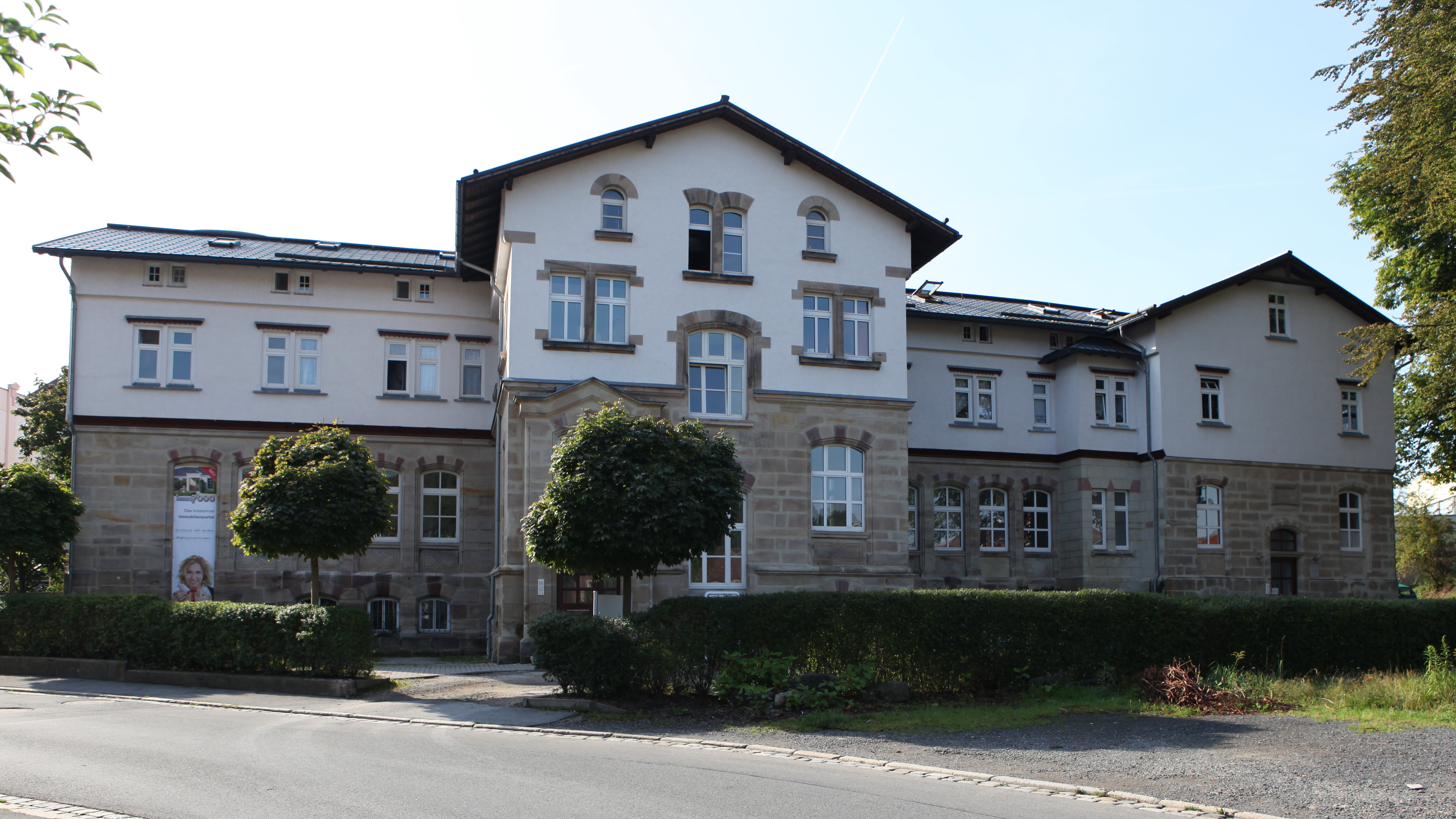 Alter Bahnhof 1857/58, Sonneberg, Am Alten Bahnhof 4